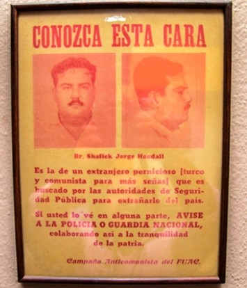 panfleto que contiene la imagen de schafik handal.